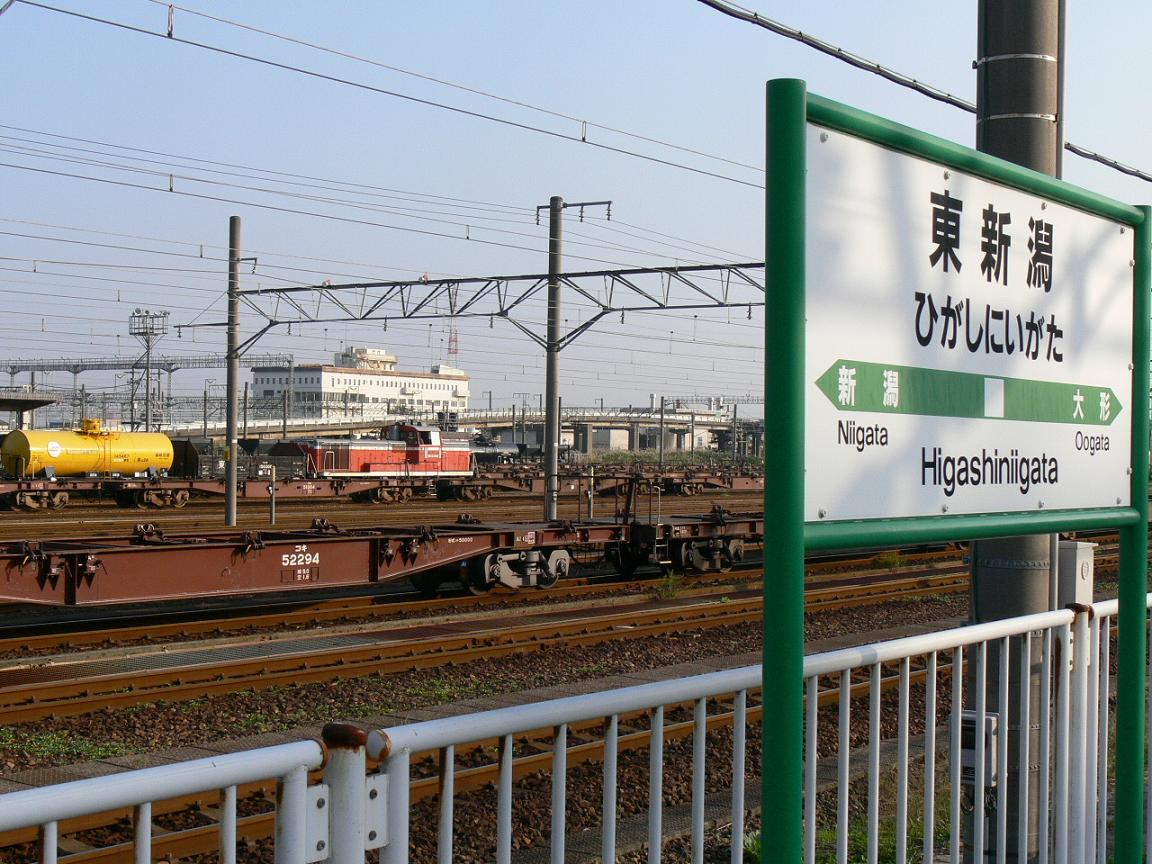 東新潟駅ホームから新潟貨物ターミナル駅構内を望む。